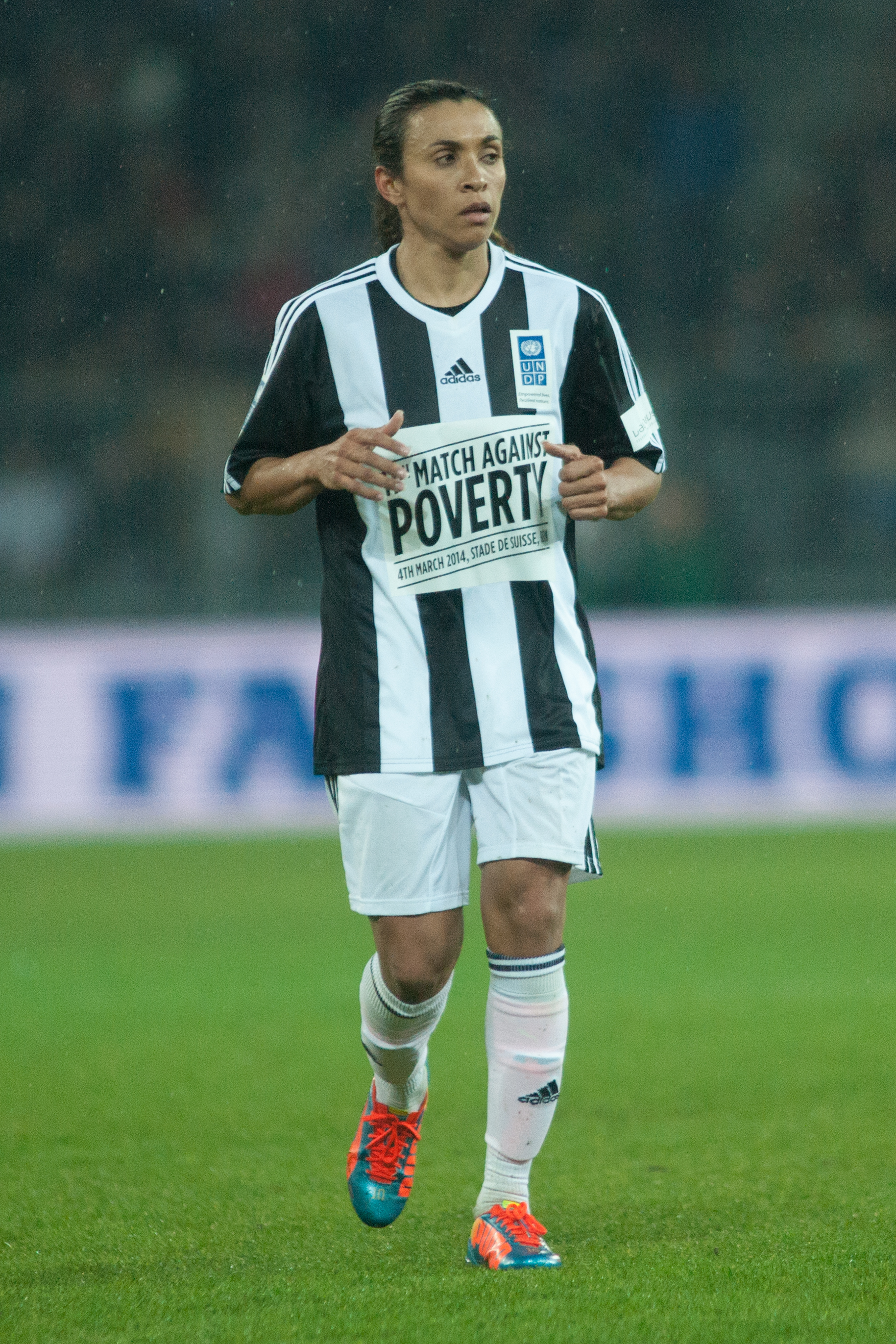 Football against poverty 2014 - Marta